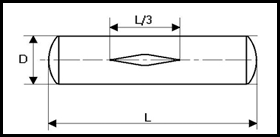 DIN 1475